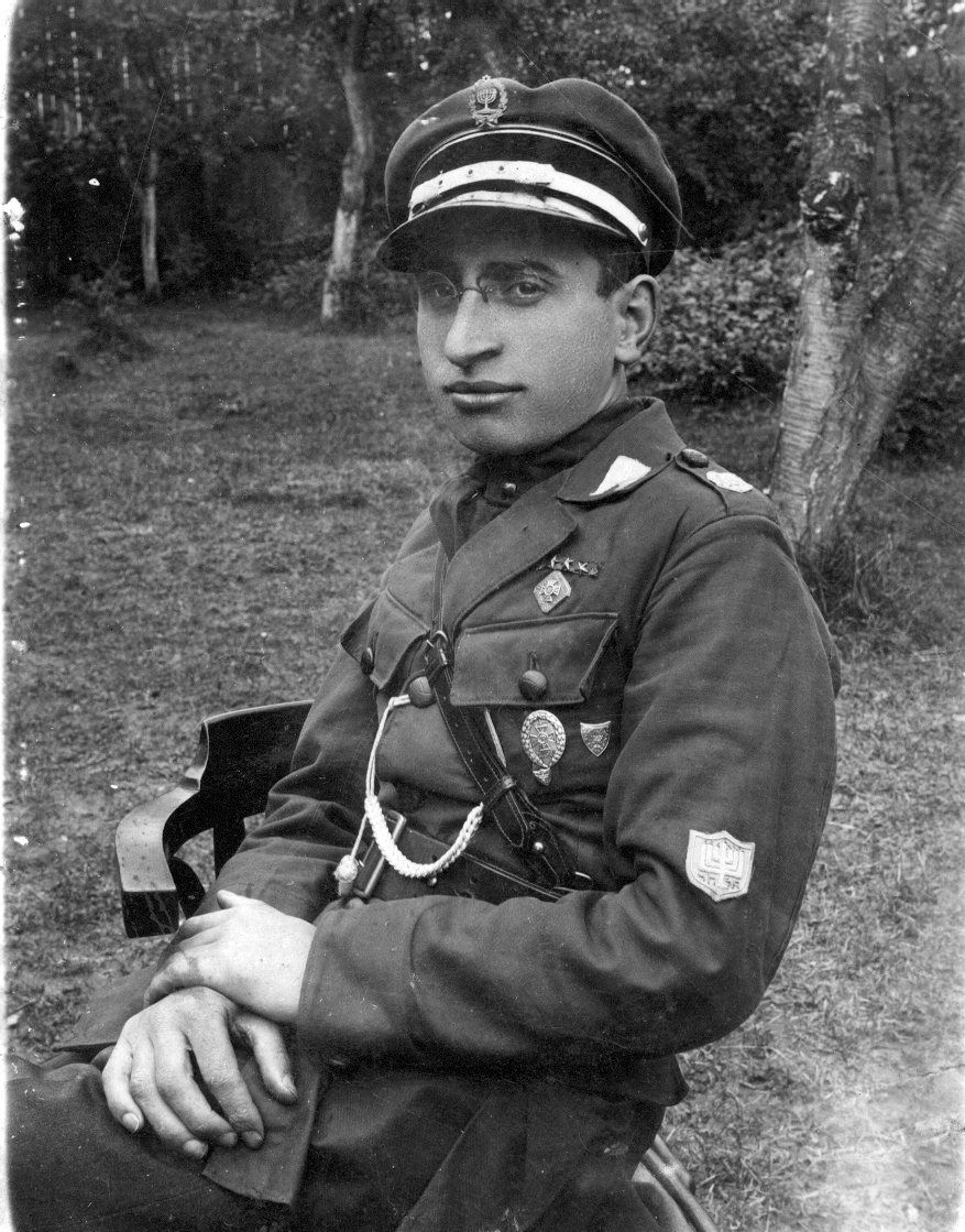 יקיר הר-זהב במדי בית"ר יושב על כסא בחיק הטבע - בסביבות 1924